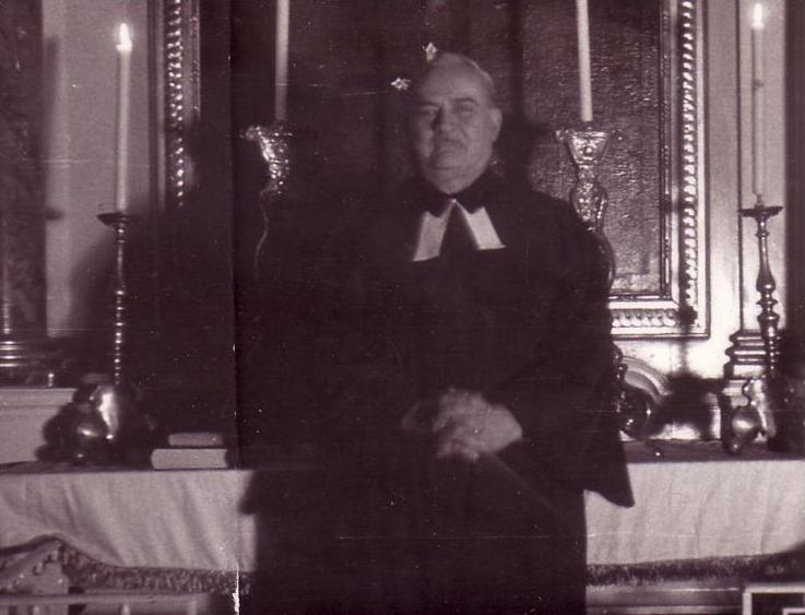 Wilhelm Rátz, Evangelischer Pfarrer der Deutschen Ev. Gemeinde A.B. in Preßburg